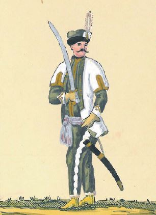 59. Generał Bielak szef 4 Pułku Ułanów (oficer 4 pułku PS Bielaka